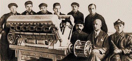 L'ingegnere russo Aleksandr Aleksandrovič Mikulin posa assieme a G. F. Ulyanov (Г. Ф. Ульянов), L. S. Татко (Л. С. Татко), V. P. Petrov (В. П. Петров), A. A. Rozenfeld (А. А. Розенфельд) e altri, dietro ad un motore aeronautico con pistoni a V (modello М-34R) dopo il completamento dei collaudi statici.